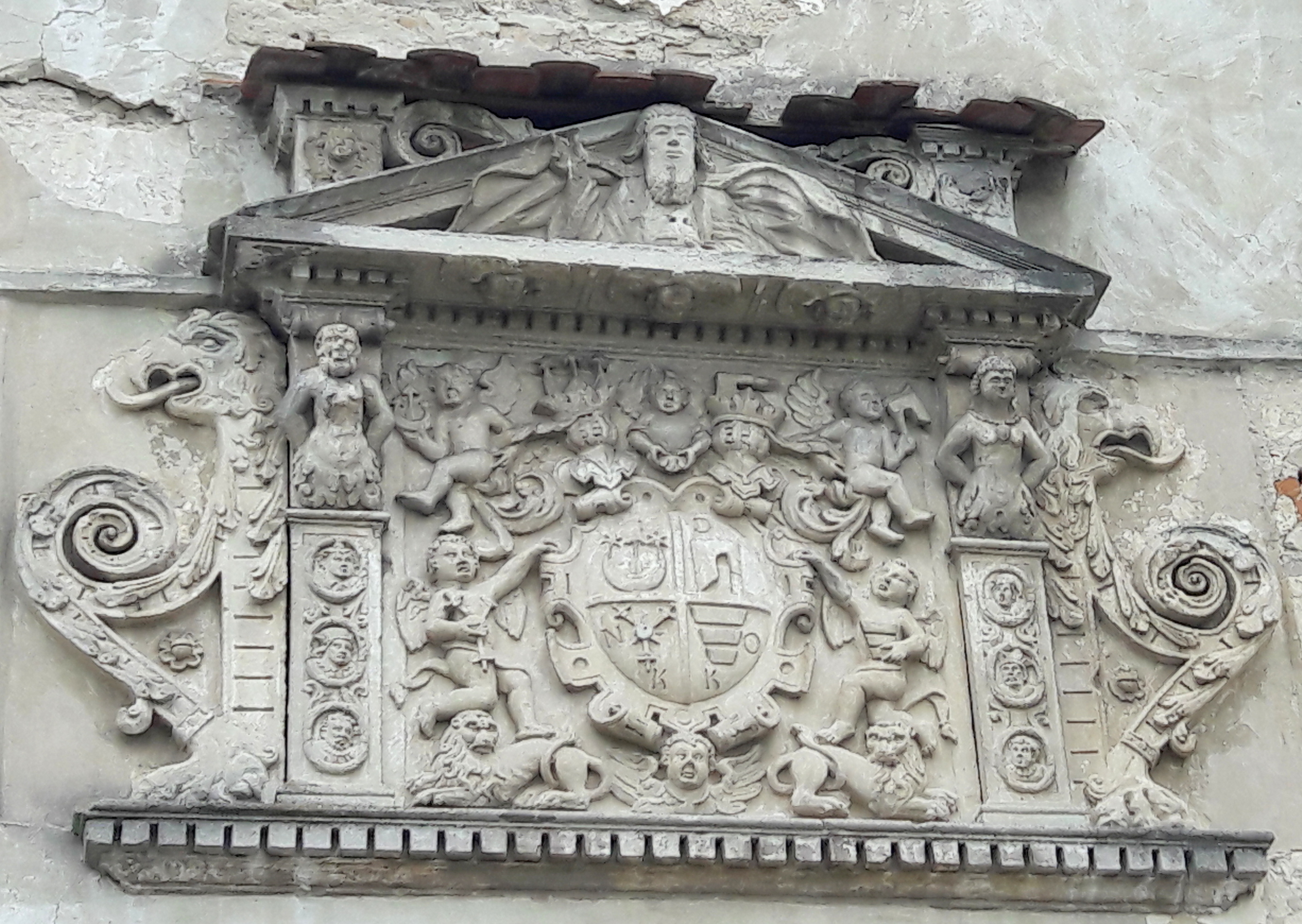 keturi herbai virš įėjimo į Oleskos pilį, Ukraina